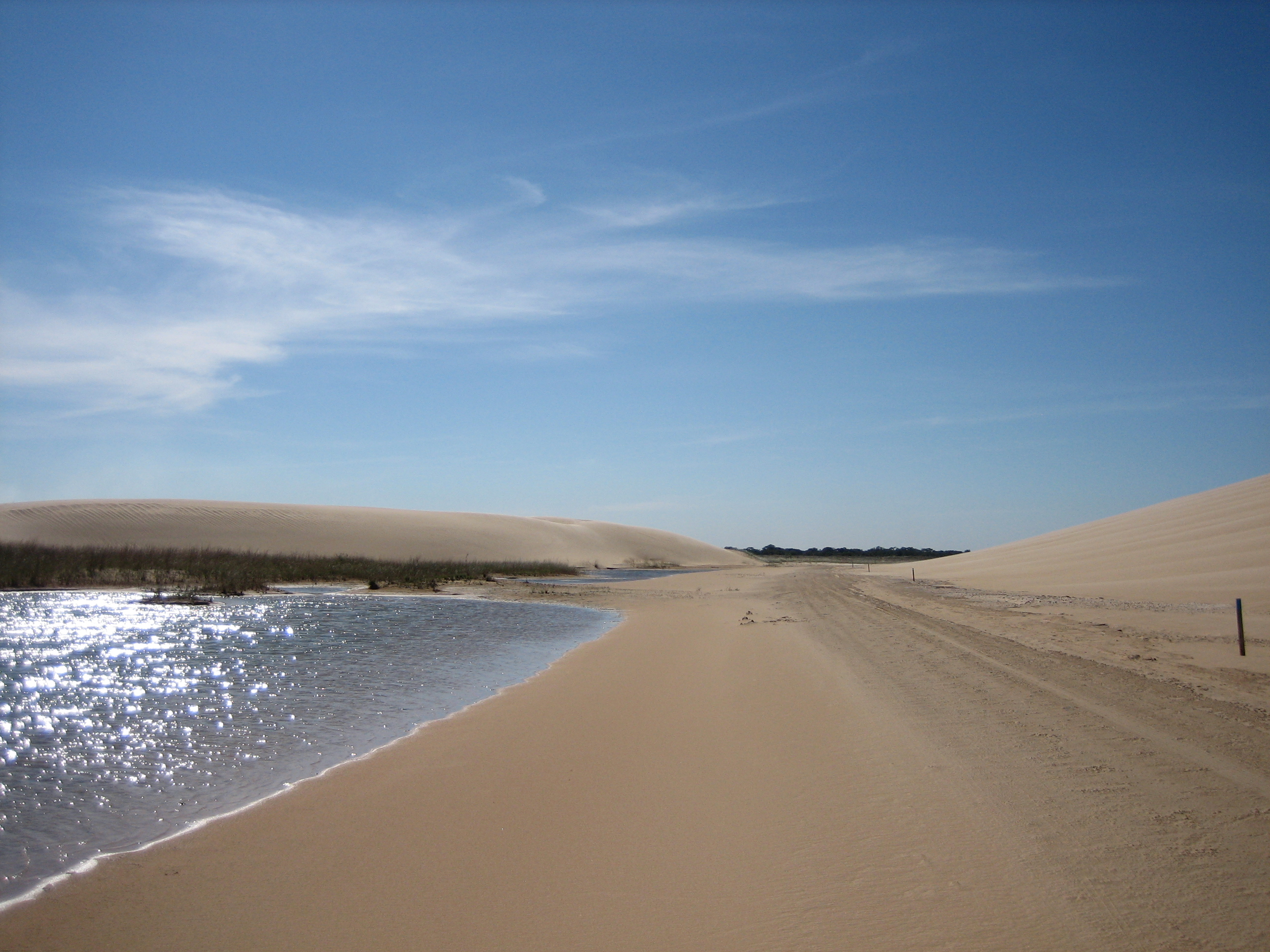 Sand dunes near Santa Cruz.